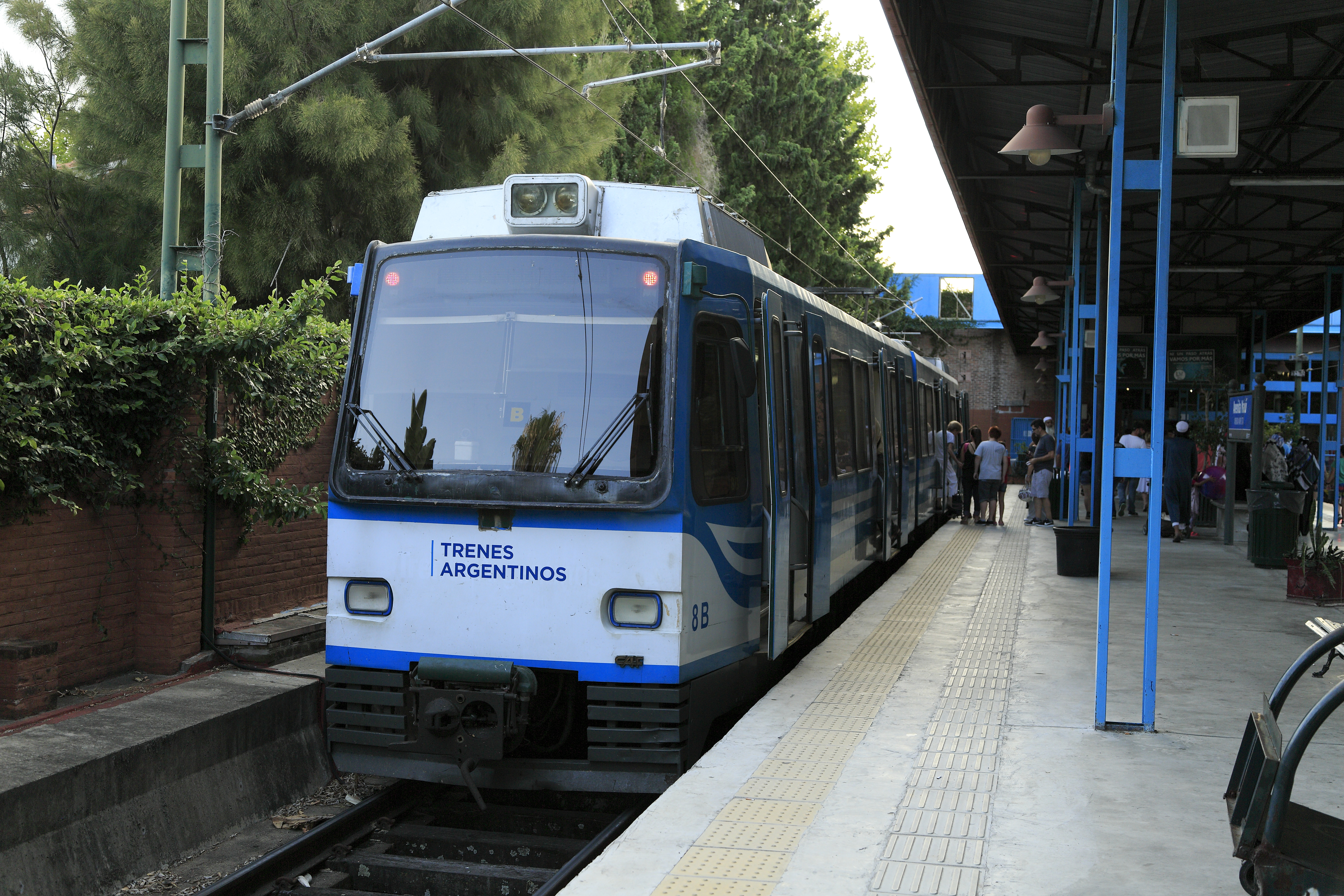 Wendehalt von und nach Delta, die »Tren de la Costa«-Strecke ist seit ihrem Neubau in Regelspur in den Achtzigern ein echter Inselbetrieb ohne Gleisverbindung zu anderen Strecken. Durch das inzwischen geschlossene Einkaufszentrum im Hintergrund besteht Übergang zum Bahnhof Bartolomé Mitre in Richtung Retiro Mitre.